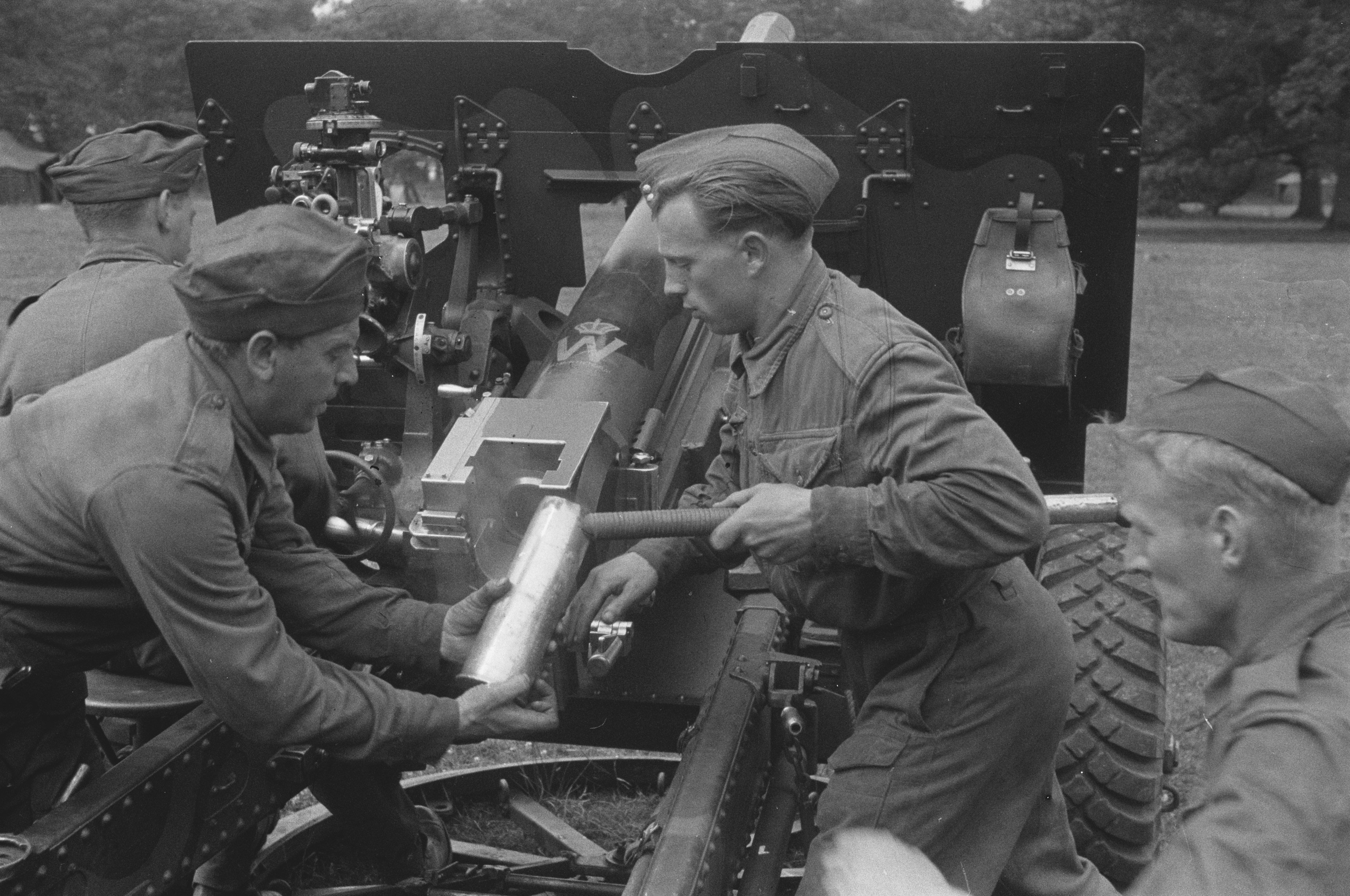 Collectie / Archief : Fotocollectie Anefo Reportage / Serie : [ onbekend ] Beschrijving : Netherlands Brigade Manoeuvres. Loading a gun [Oefeningen Prinses Irene Brigade. Laden van een kanon] Datum : augustus 1943 Locatie : Groot-Brittannië Trefwoorden : leger, manoeuvres, soldaten, tweede wereldoorlog Fotograaf : Onbekend / Publiek Domein, [onbekend] Auteursrechthebbende : Nationaal Archief Materiaalsoort : Negatief (zwart/wit) Nummer archiefinventaris : bekijk toegang 2.24.01.05 Bestanddeelnummer : 934-9340